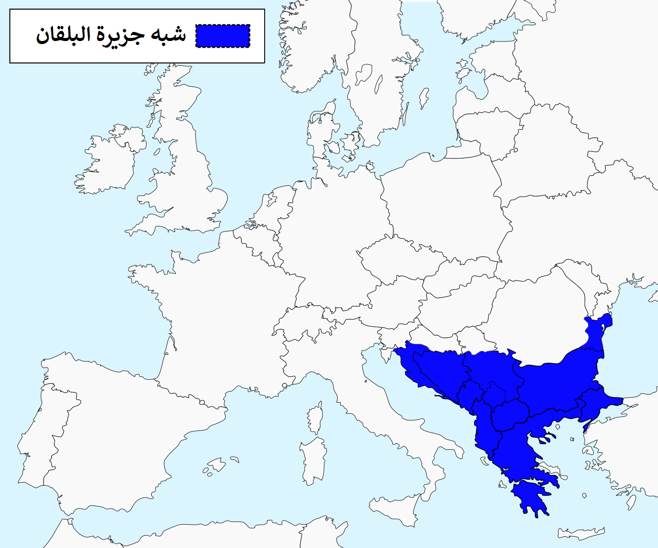 شبه جزيرة البلقان كما يُتعارف على حُدودها: أنهُر الطونة (الدانوب) وصوه (الساڤا) وكوپا.